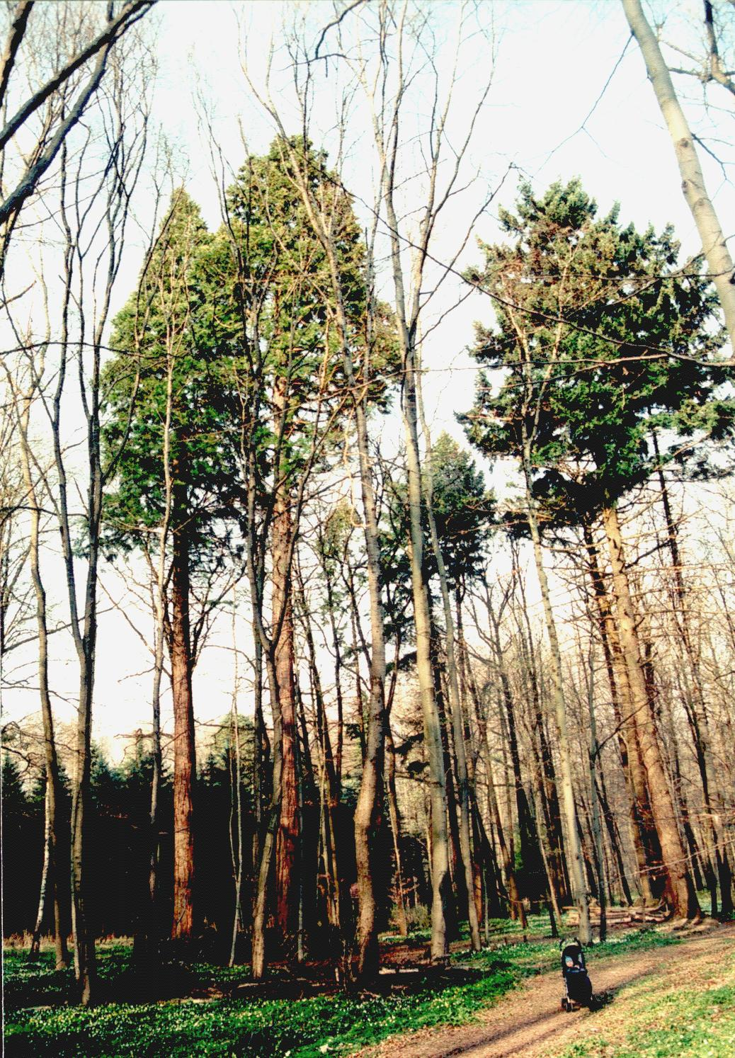 Mammutbäume im Westen des Mühlhäuser Stadtwalds. Eigene Fotorafie vom April 2003.